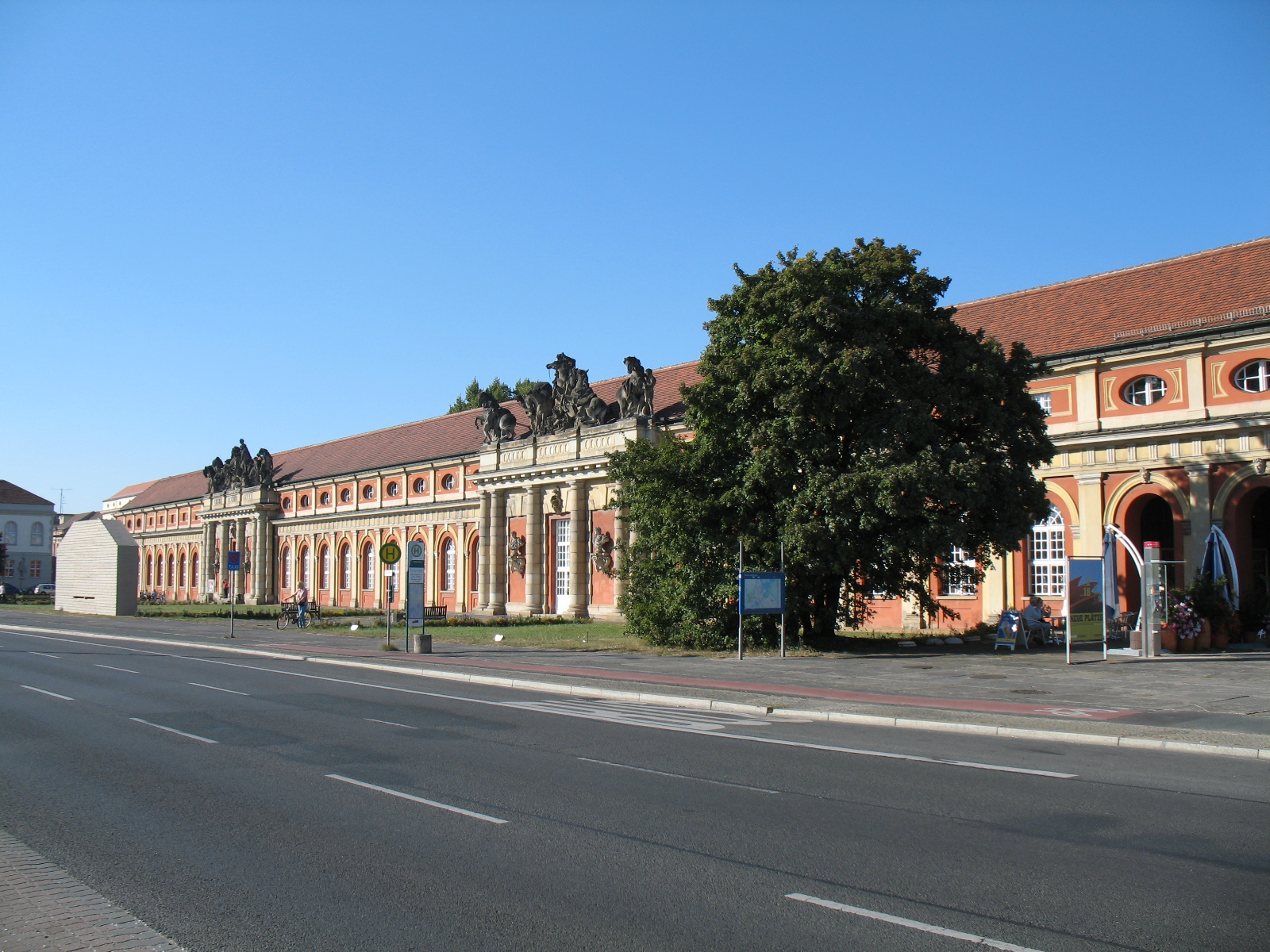 Das Filmmuseum im Potsdamer Marstall, gesehen von der Breite Str.